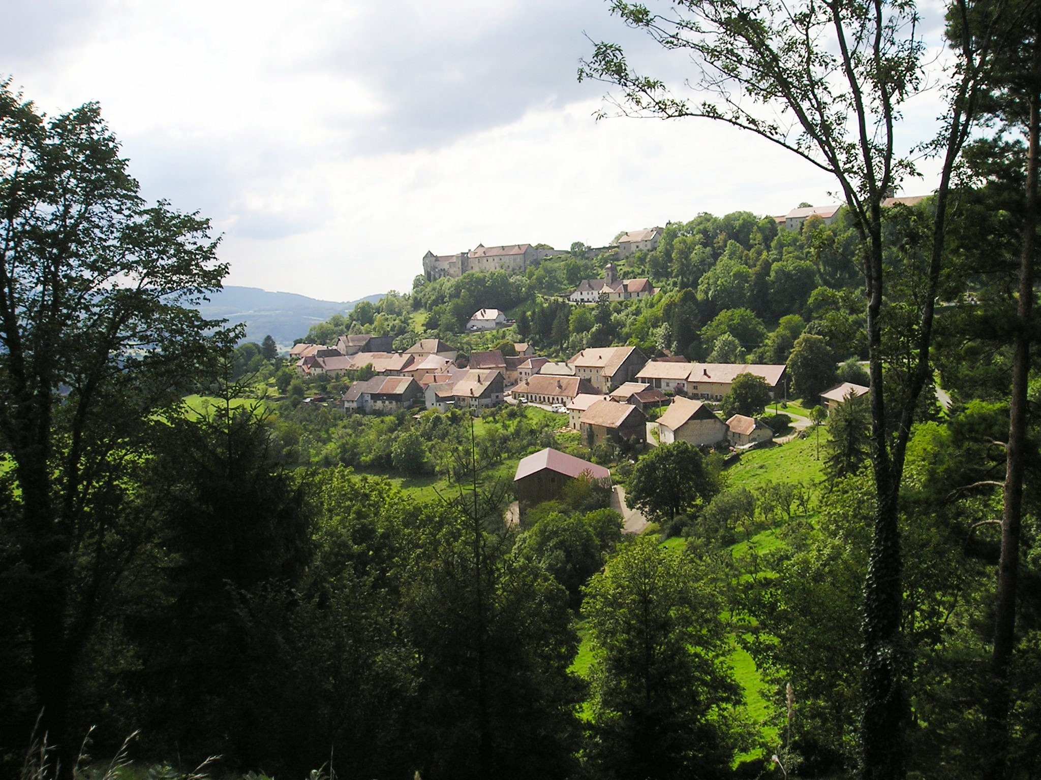 Belvoir